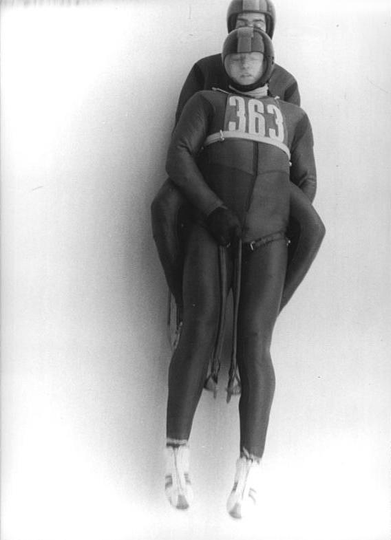 Horst Müller, Hans-Jürgen Neumann ADN-ZB Kluge 5.1.1975-Bezirk Suhl: DDR-Meisterschaften im Rennschlittensport in Oberhof-Beim Neue Titelträger im Herren-Doppelsitzer wurden überraschend Horst Müller (r.)-Hans-Jürgen Neumann (SC Traktor Oberwiesenthal-ASK Oberhof) mit einer Gesamtzeit von 1:29,56 min.